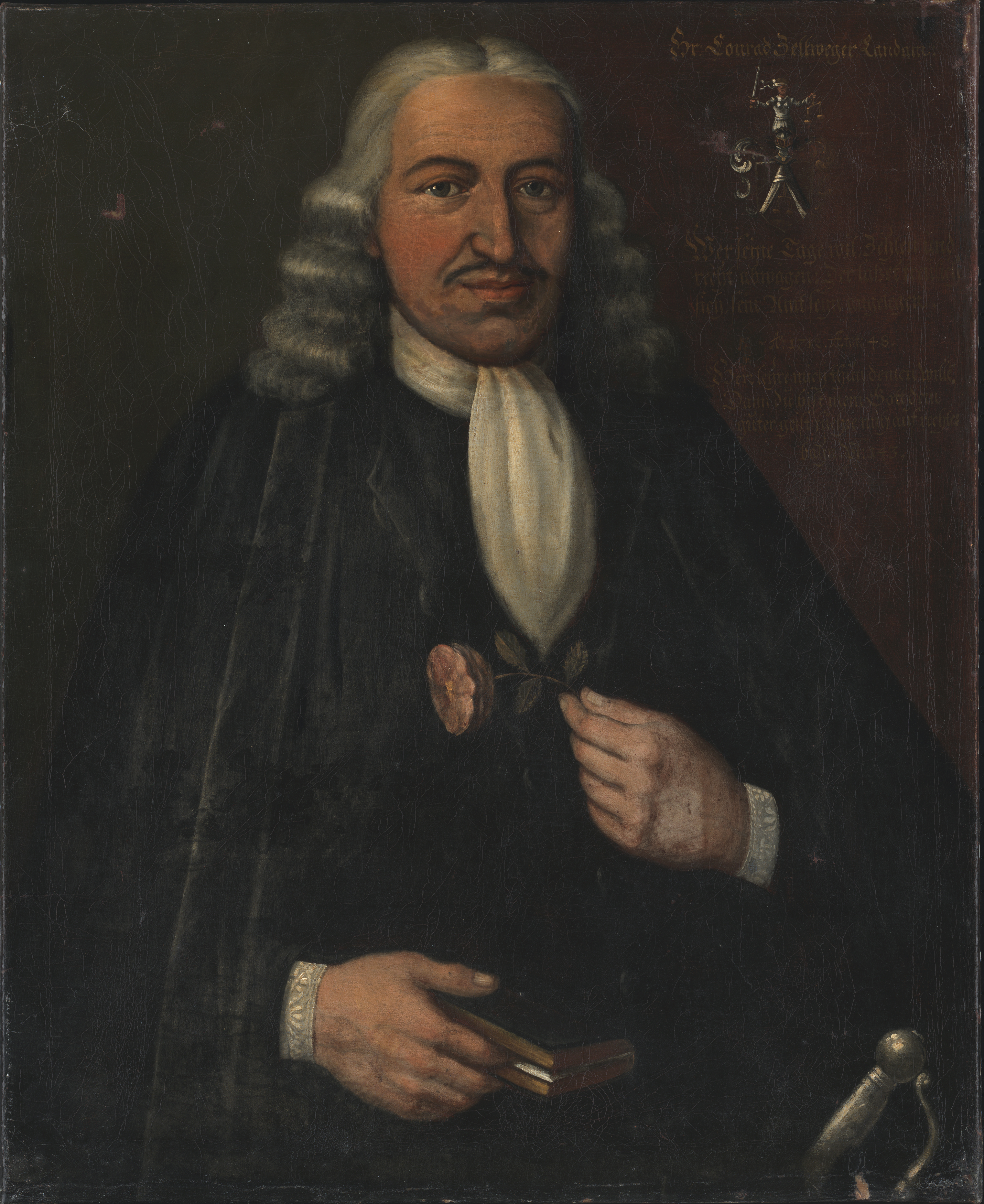 18. Landammann von Appenzell Ausserrhoden, Brustbildnis